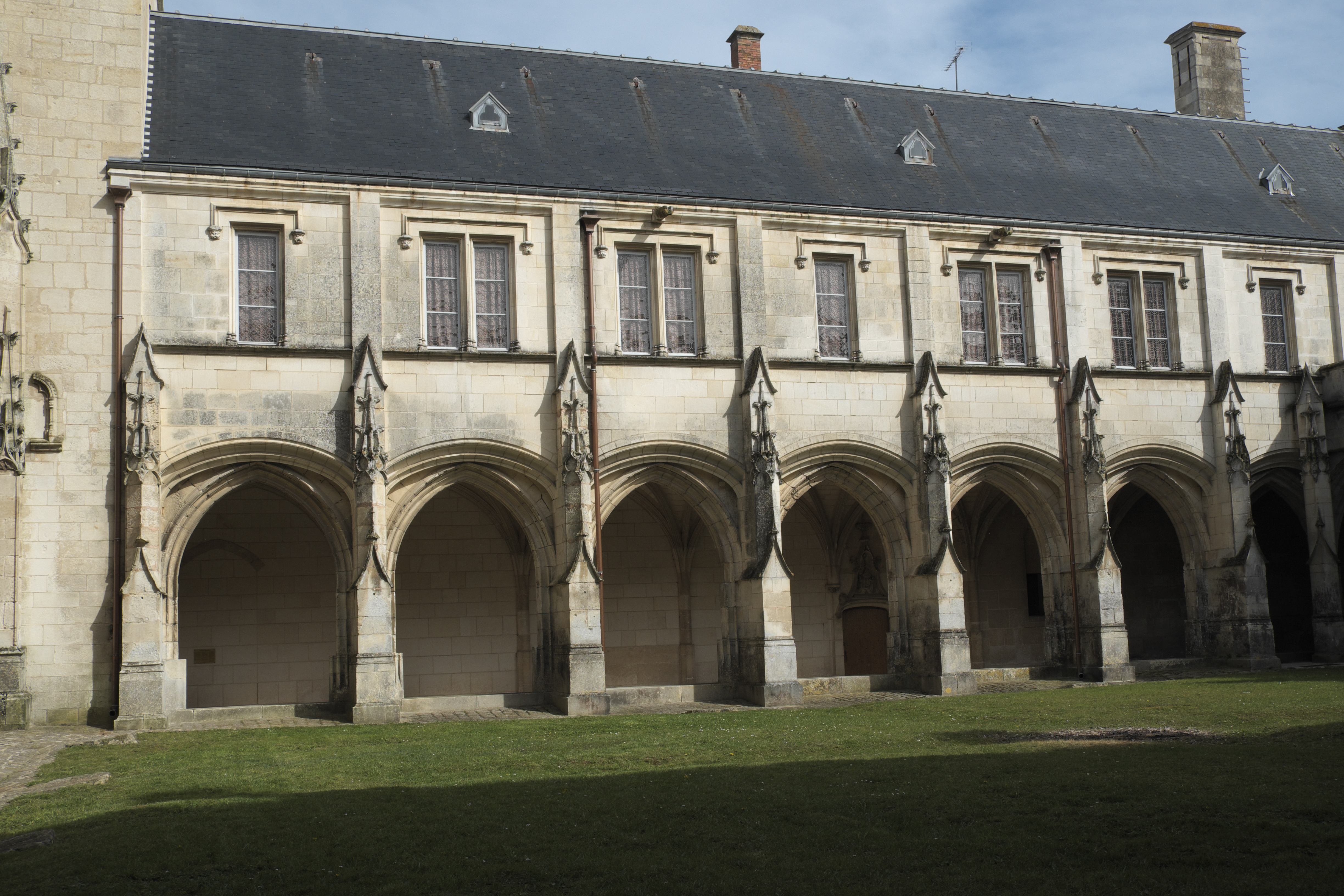 Kreuzgang der Kathedrale Notre-Dame-de-l’Assomption in Luçon im Département Vendée (Pays de la Loire/Frankreich)